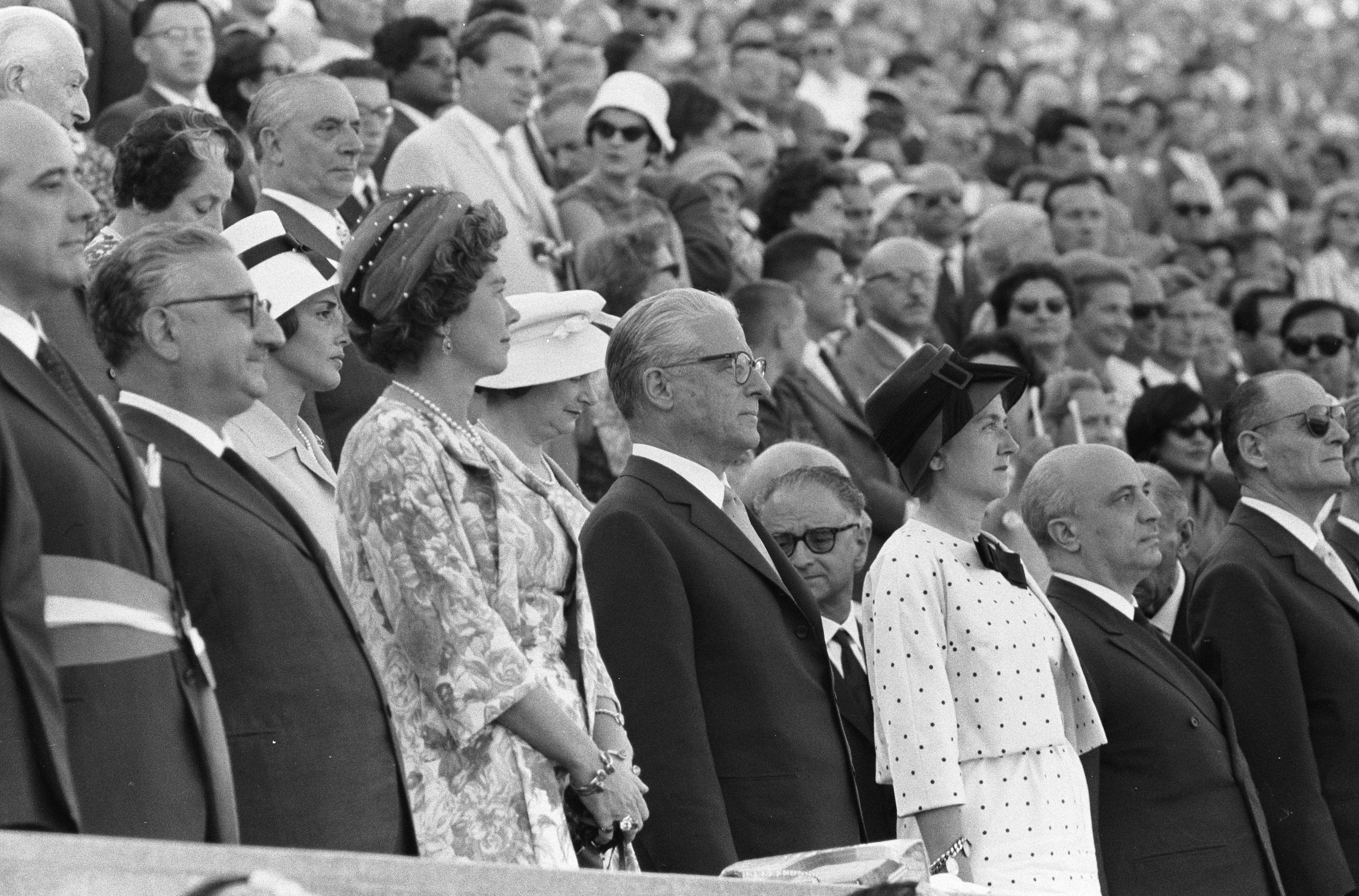 Collectie / Archief : Fotocollectie Anefo Reportage / Serie : [ onbekend ] Beschrijving : Olympische Spelen te Rome. Opening. President van Italie Gronchi Datum : 25 augustus 1960 Locatie : Rome Trefwoorden : openingen, presidenten Persoonsnaam : Gronchi, Giovanni Fotograaf : Pot, Harry / Anefo Auteursrechthebbende : Nationaal Archief Materiaalsoort : Negatief (zwart/wit) Nummer archiefinventaris : bekijk toegang 2.24.01.05 Bestanddeelnummer : 911-5409